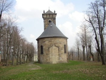 Česky: Jiřetín pod Jedlovou, kaple na Křížové hoře